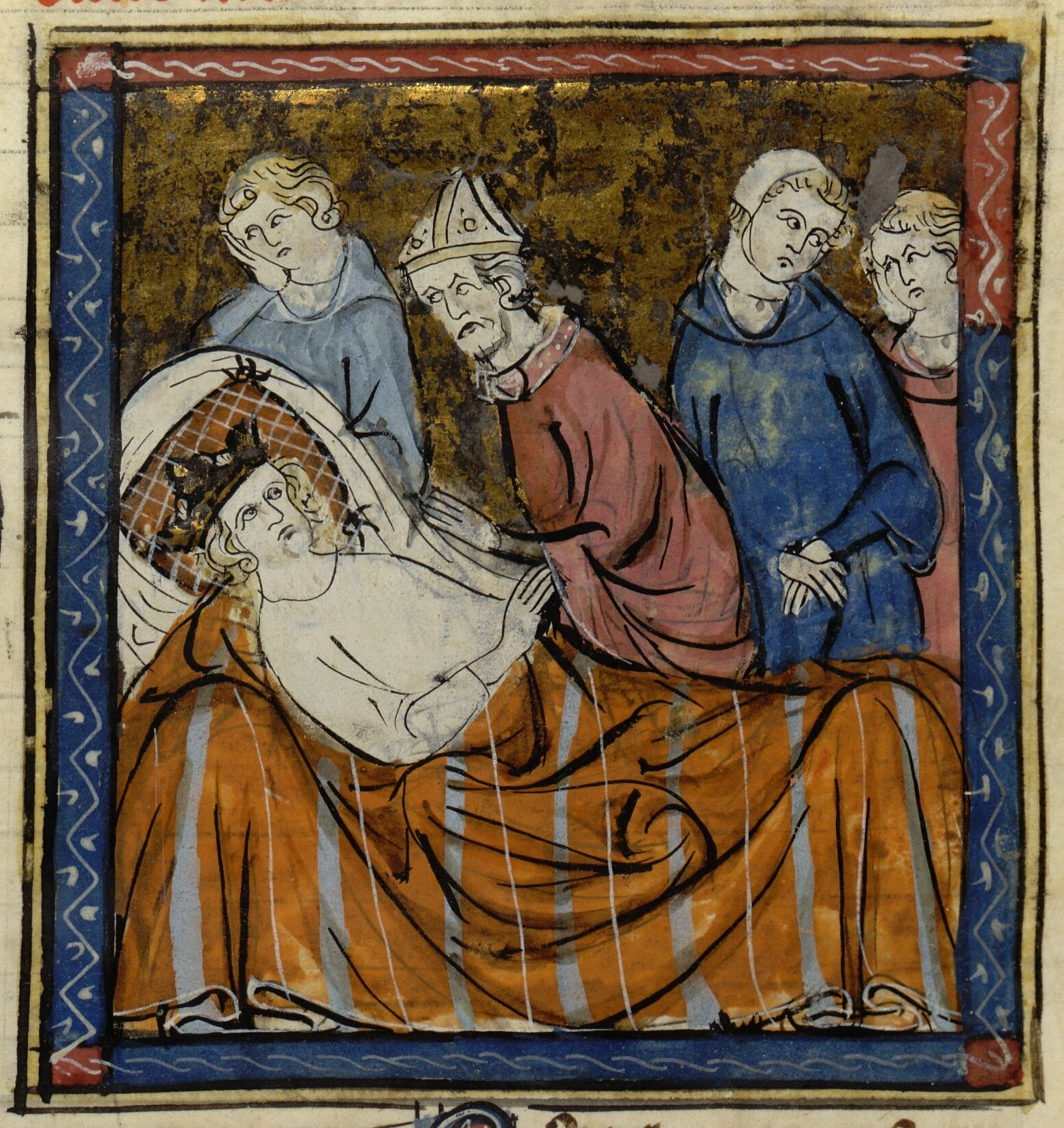 Louis IX malade